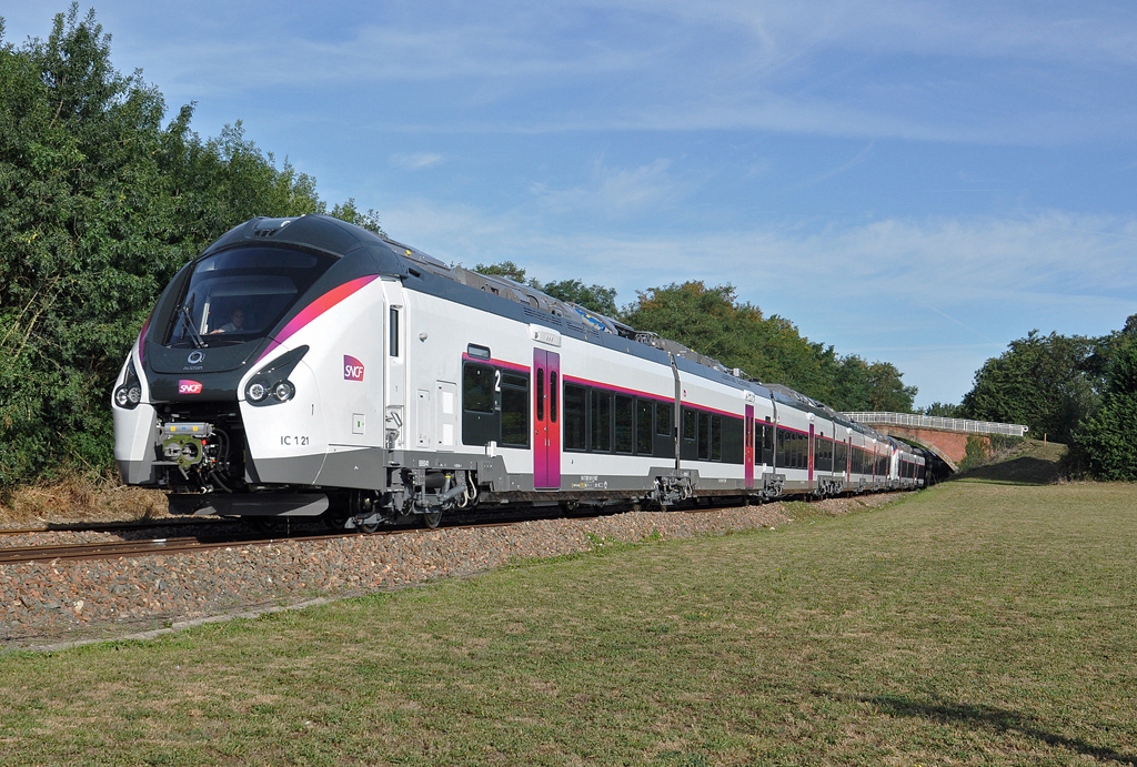 Le premier train Nantes Bordeaux numéro 3831 assuré en Coradia Liner passe Nesmy en Sud-Vendée. Il est composé des rames 21 et 24